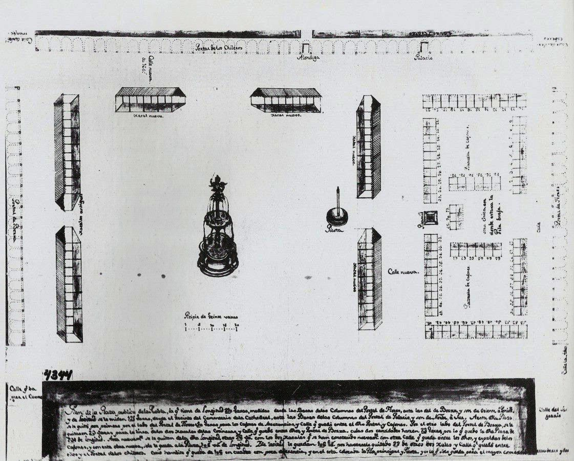 Plaza Mayor de Puebla, siglo XVII